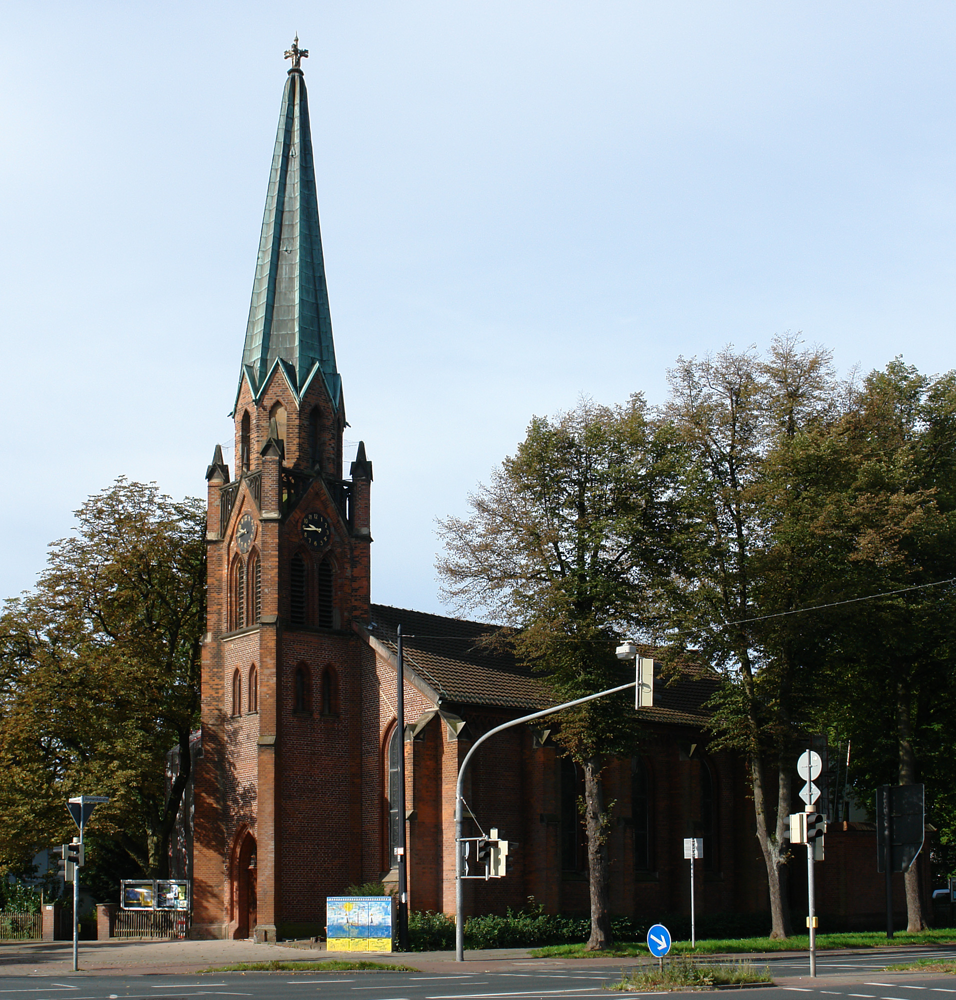 Alt Hastedter Kirche in Bremen, Bennigsenstraße 7 / Bismarckstraße.Das abgebildete Objekt ist ein geschütztes Kulturdenkmal in der Freien Hansestadt Bremen, mit der Nr. 0121 beim Landesamt für Denkmalpflege registriert.